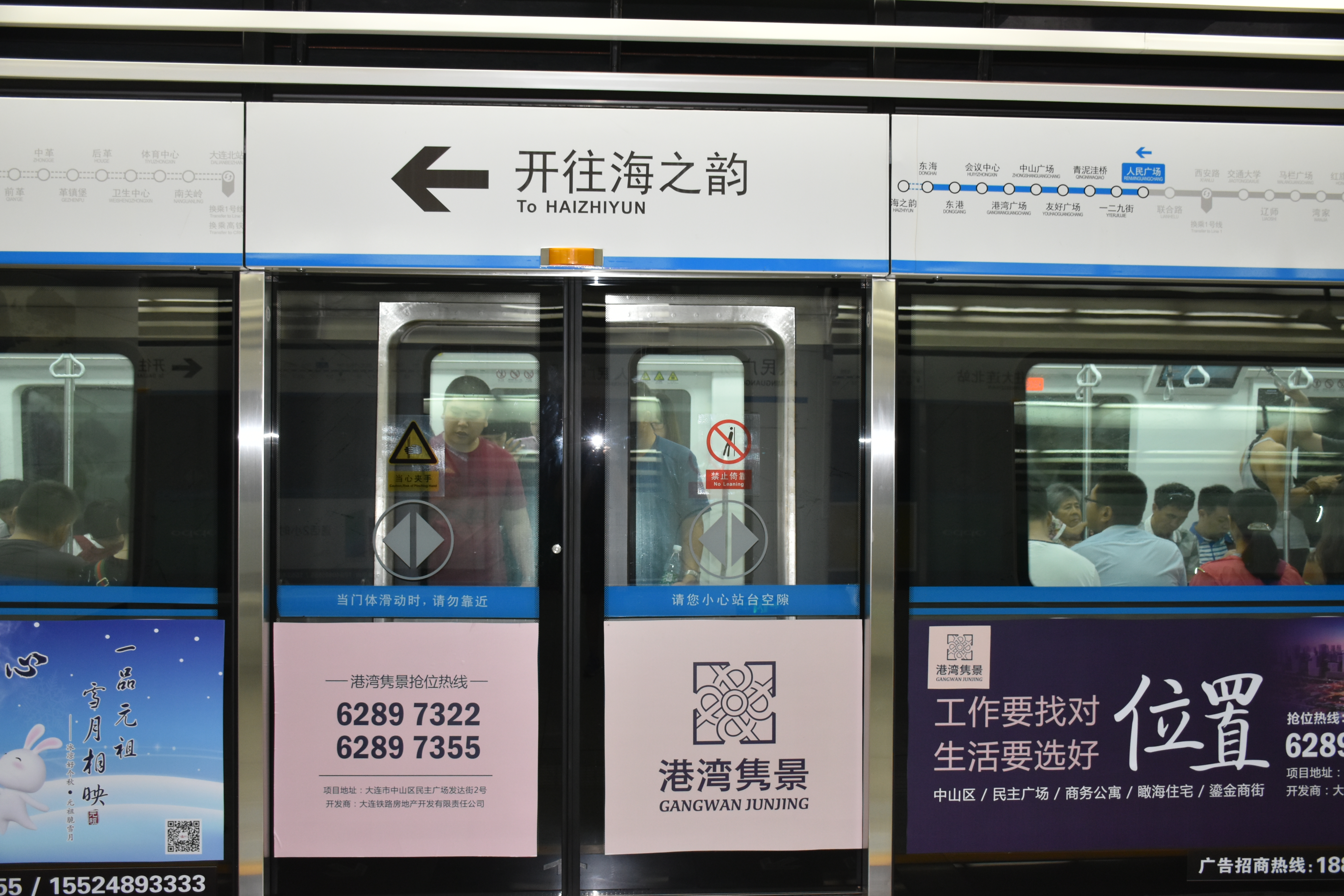 大连地铁2号线人民广场站屏蔽门。